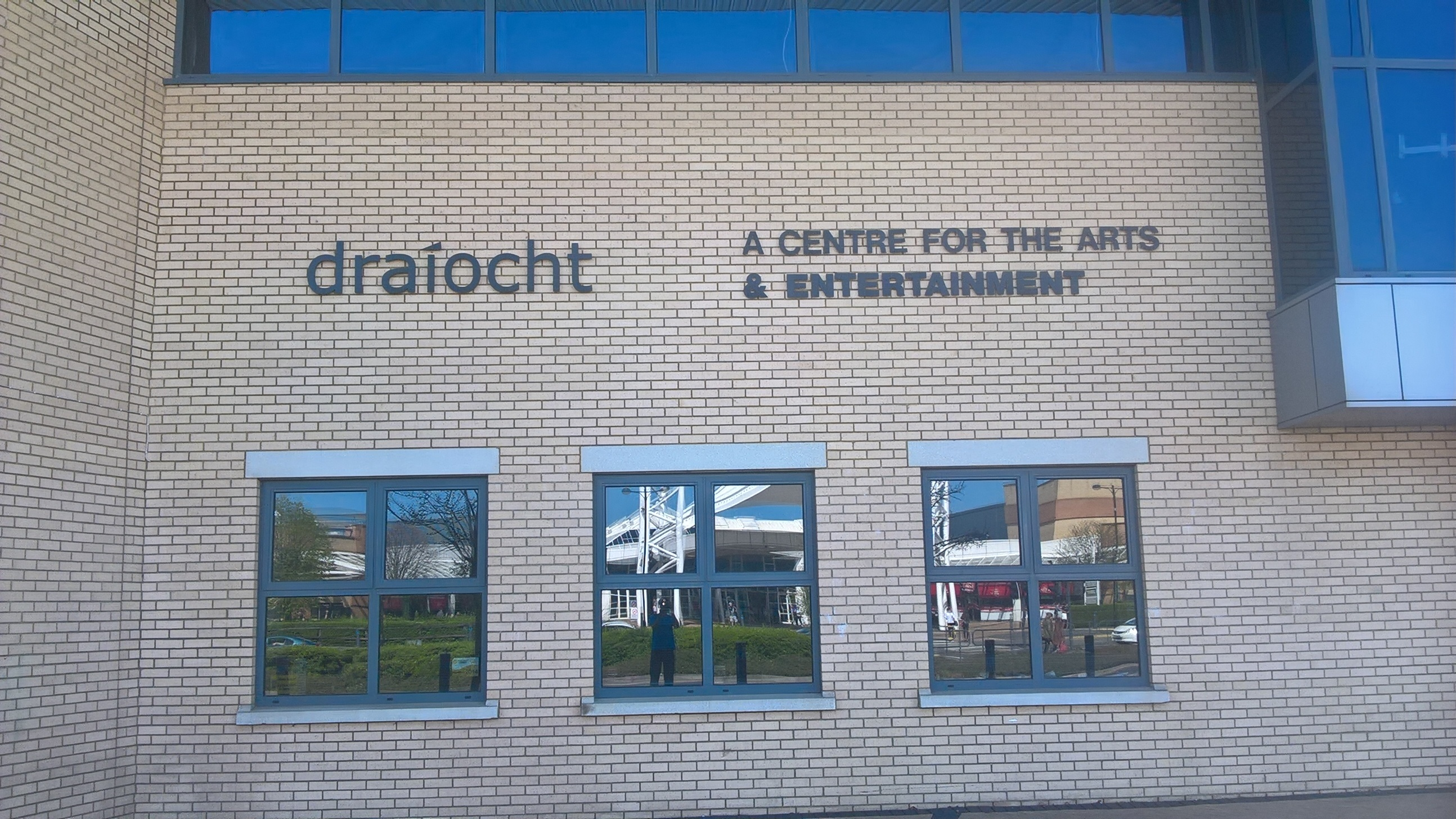 Ionad Ealaíon Draíocht, Baile Bhlainséir, Baile Átha Cliath.